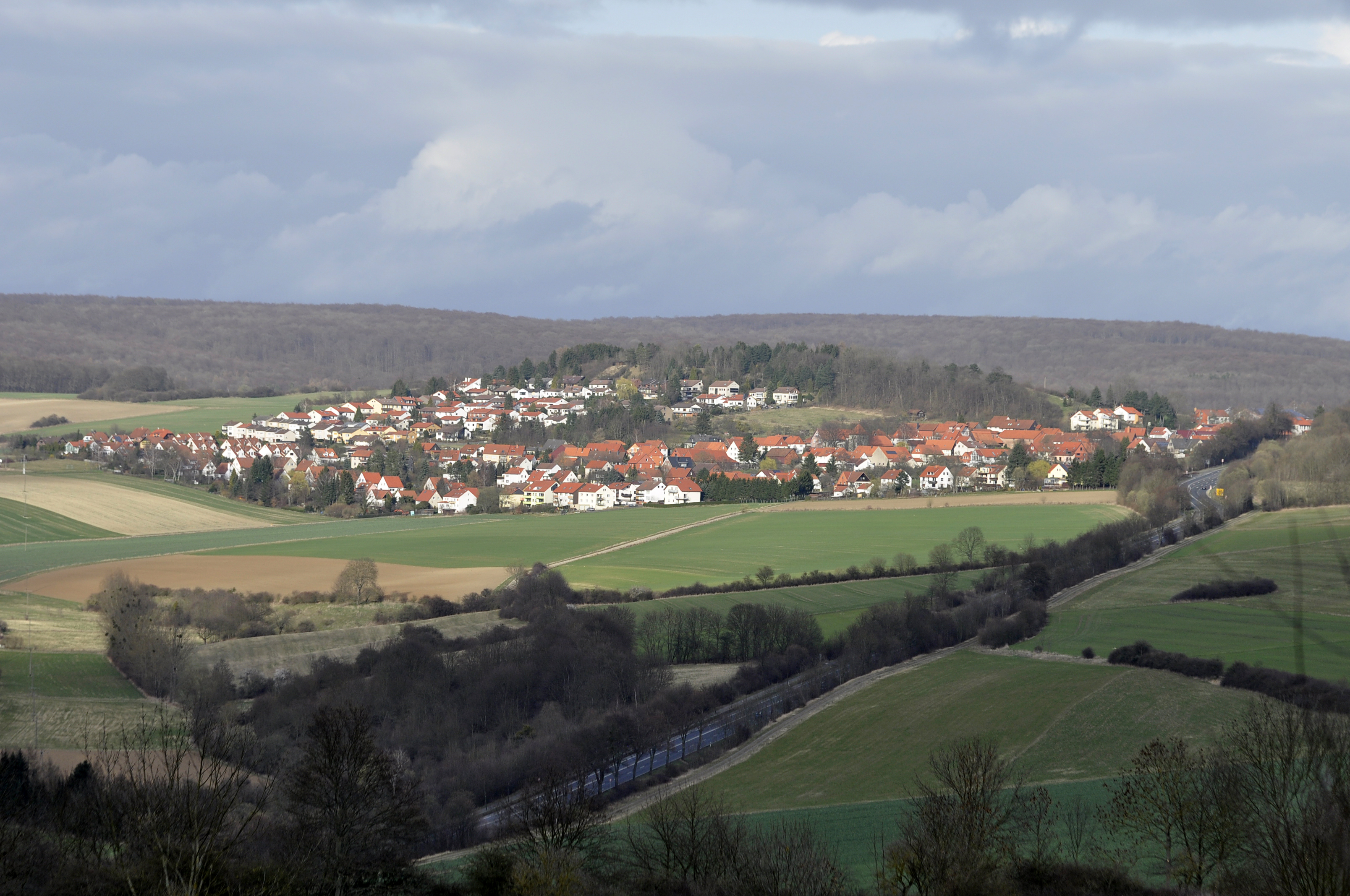 Roringen bei Göttingen, aufgenommen von Süden (südlich von Herberhausen), 15. März 2014. Foto: Francisco Welter-Schultes.